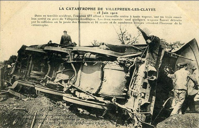 Catastrophe ferroviaire de Villepreux les Clayes